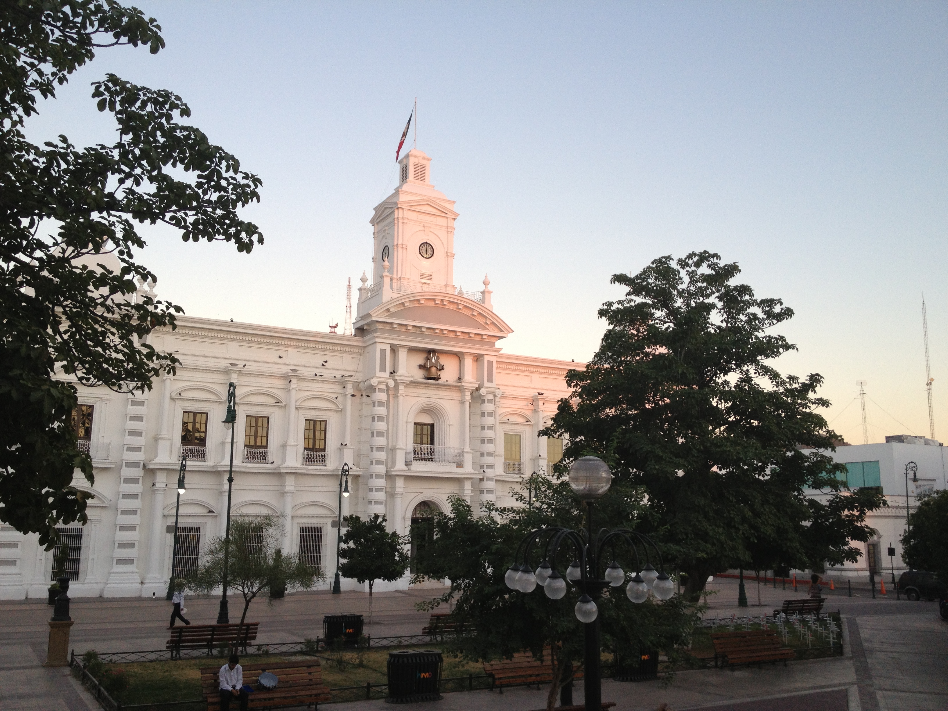 Fotografía del Palacio de Gobierno de Sonora en Hermosillo desde el kiosko de "Catedral". Esta construcción inaugurada a principios del Siglo XIX presenta una fachada sobria de estilo neoclásico, con frontón semicircular y una torre con reloj. Su diseño es de inspiración neoclásica, de líneas rectas y ornamentado con una torre central. Al centro del edificio, la portada esta dividida en tres niveles; en el primer nivel se encuentra el acceso con arco peraltado y pilastras, en el segundo nivel tiene arco abocinado al centro y con moldura, balcón y columna de orden jónico en relieve, y el tercer nivel presenta pilastras pequeñas flanqueando una campana.